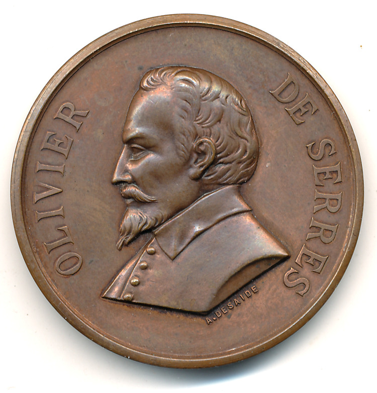 Médaille à l'effigie d'Olivier de Serres gravée par Alphonse Desaide, 37mm